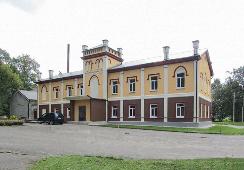 Бердаўка. Сядзібны дом